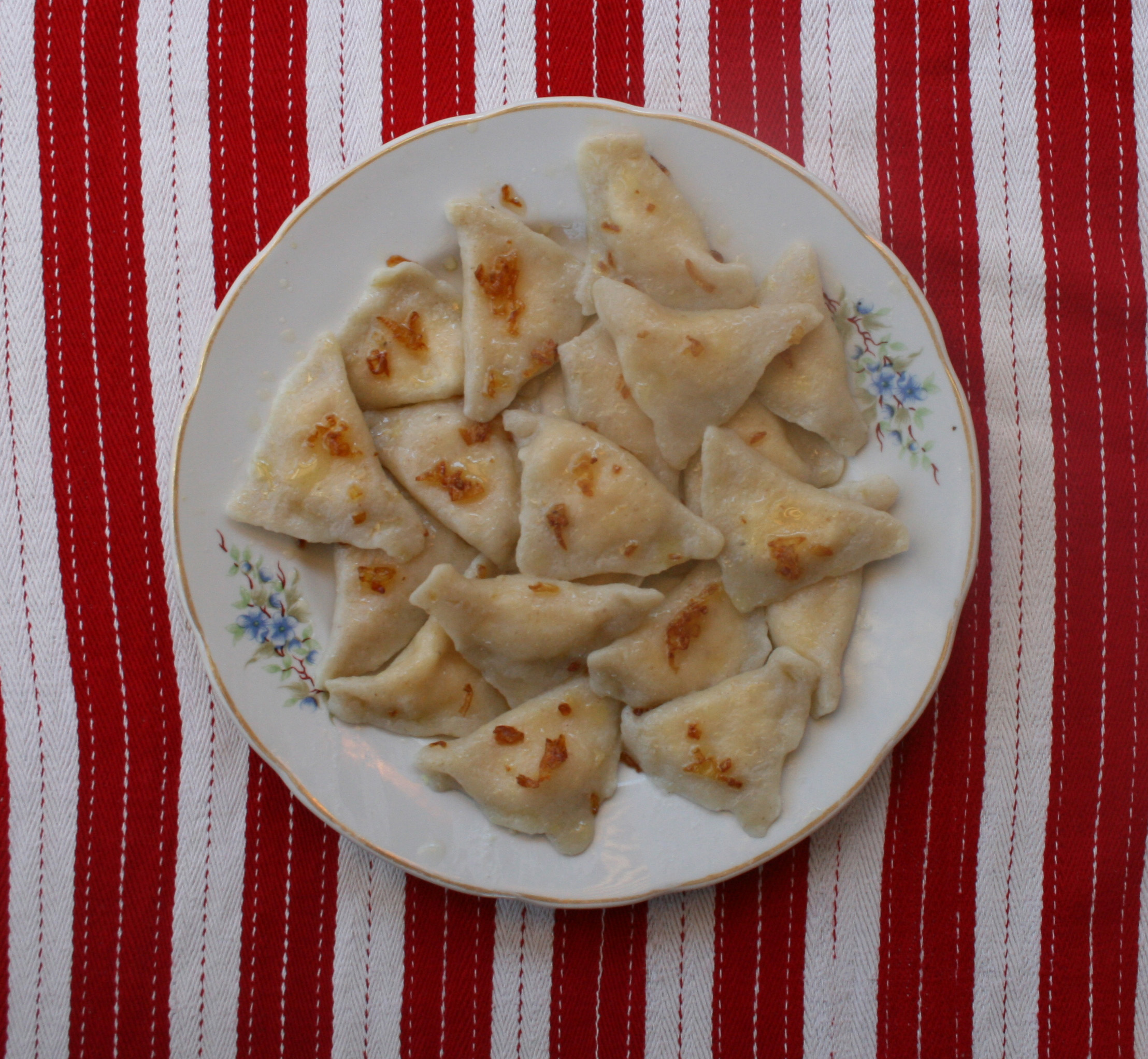 Gazdovské pirohy